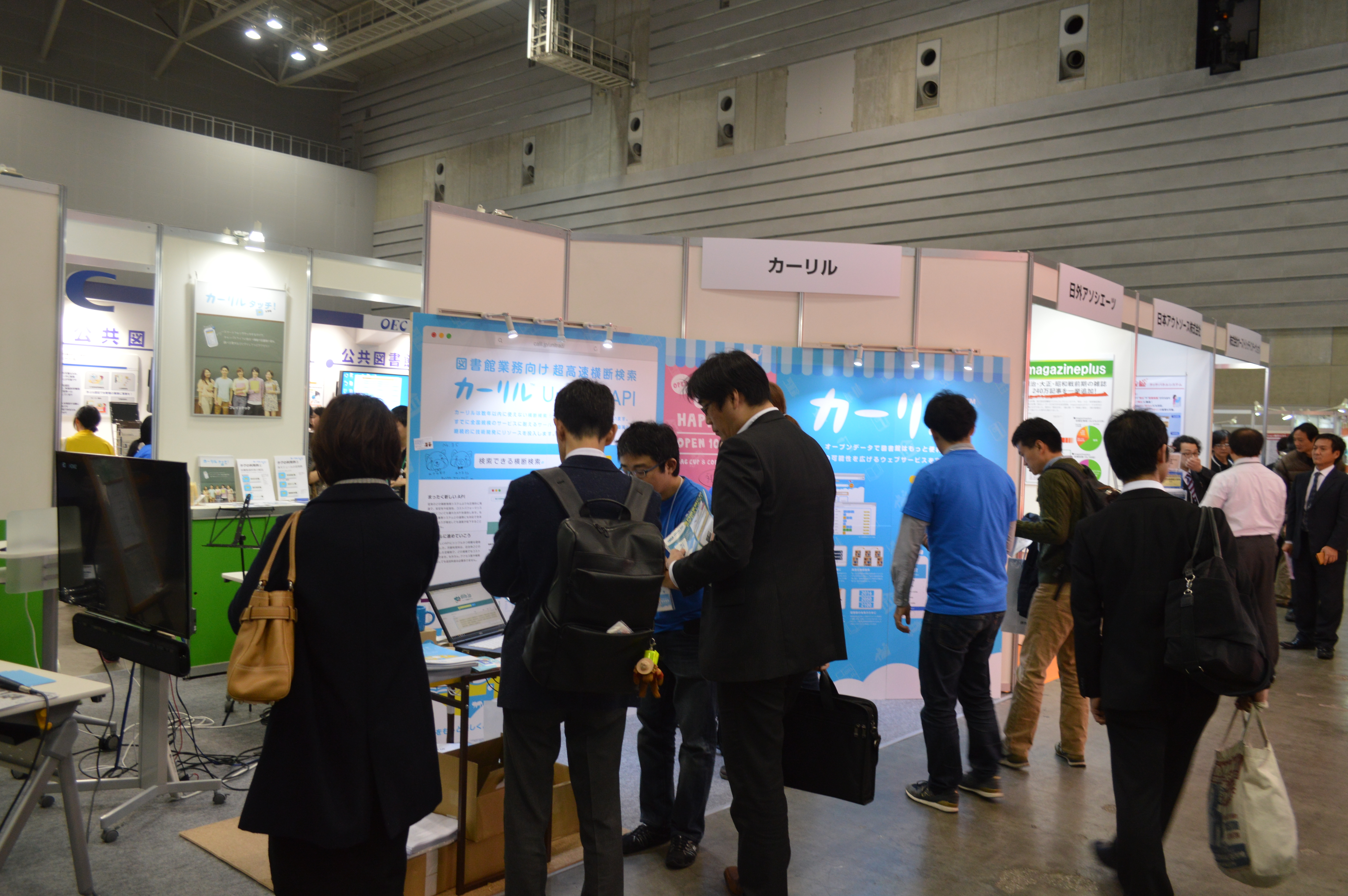 パシフィコ横浜で開催された図書館総合展2016最終日。カーリルのブース。